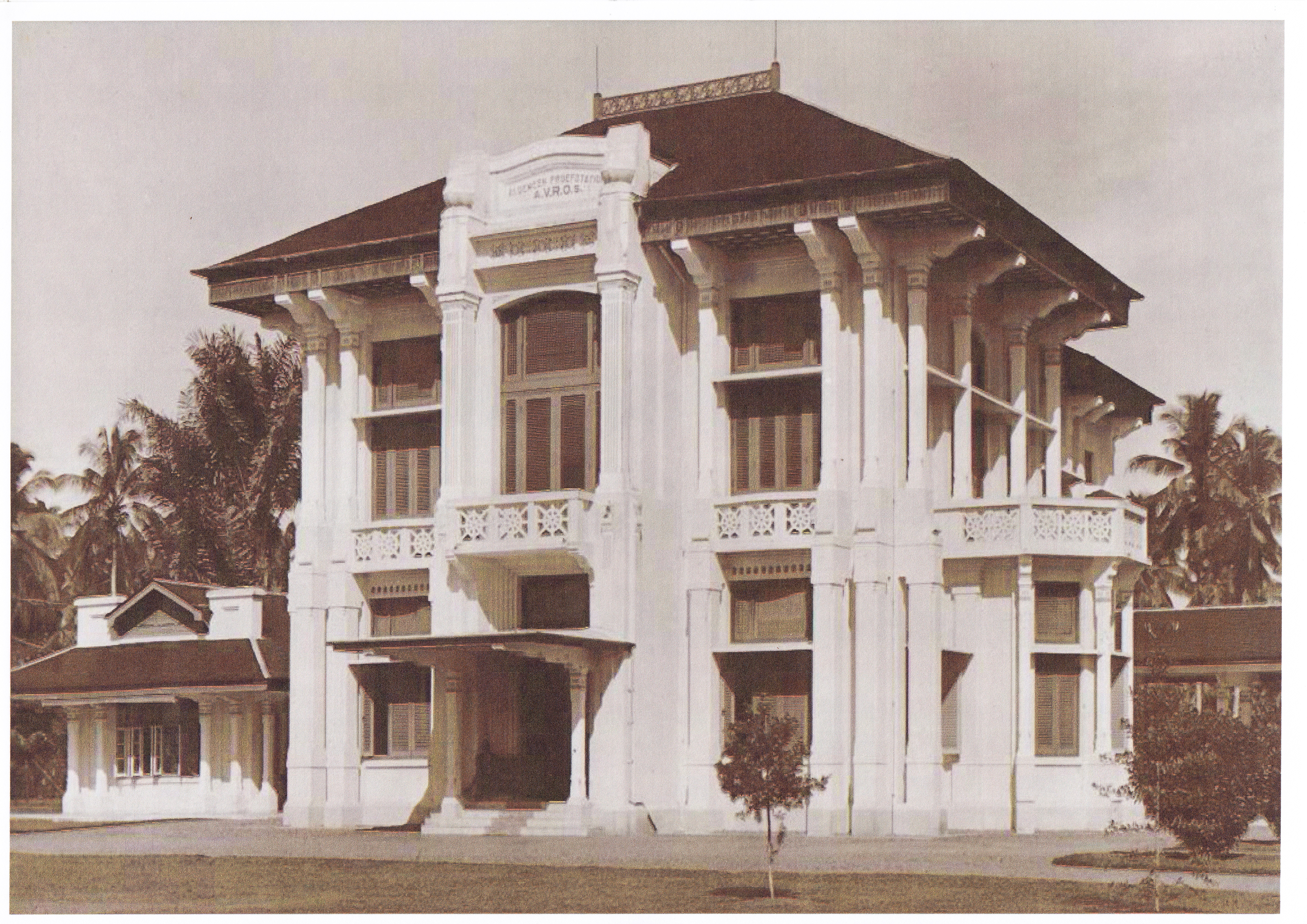 Foto lama gedung utama PPKS